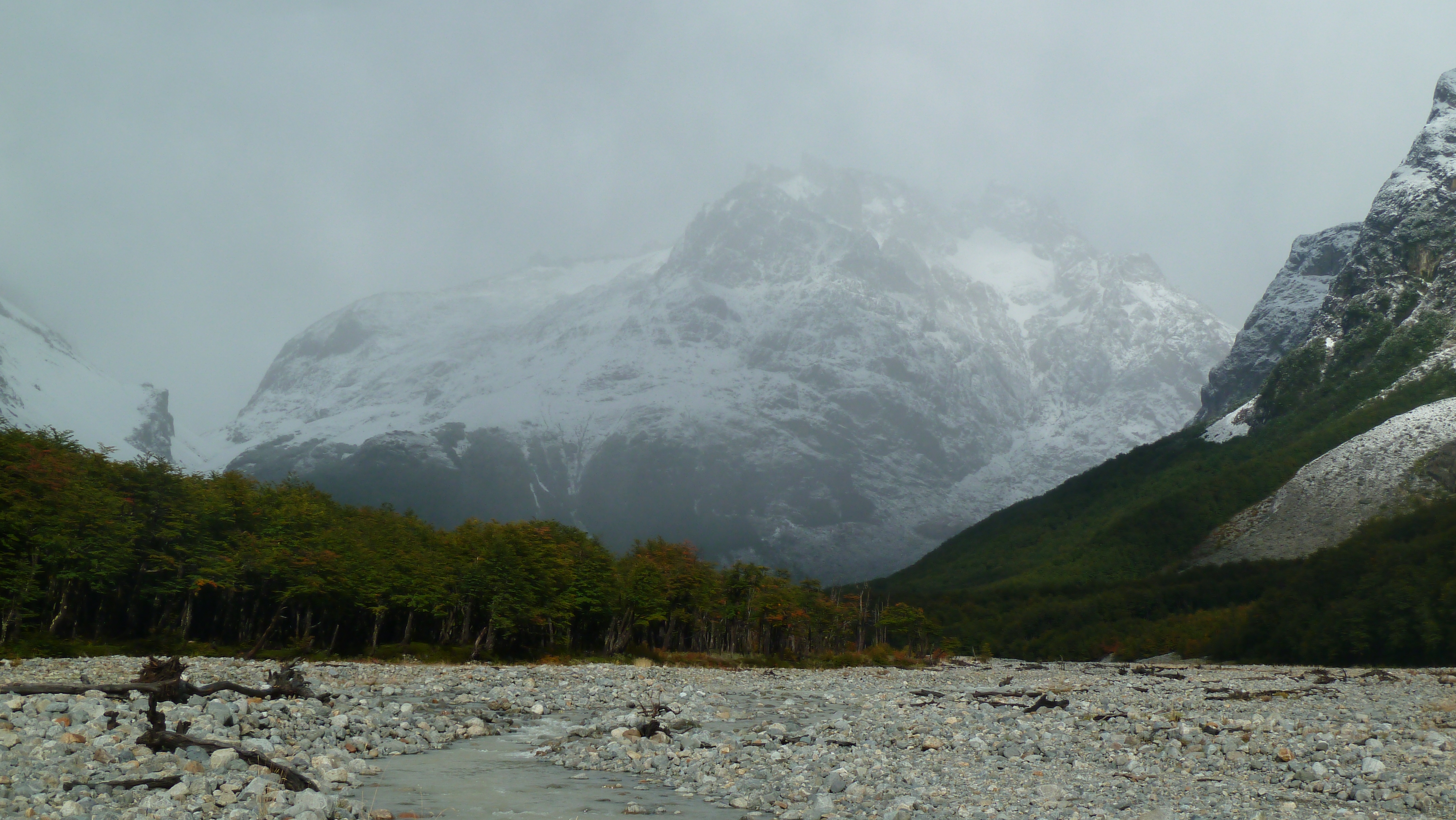 El río Turbio es un río que se encuentra en la zona sur-oeste de la Provincia de Santa Cruz en la República Argentina.